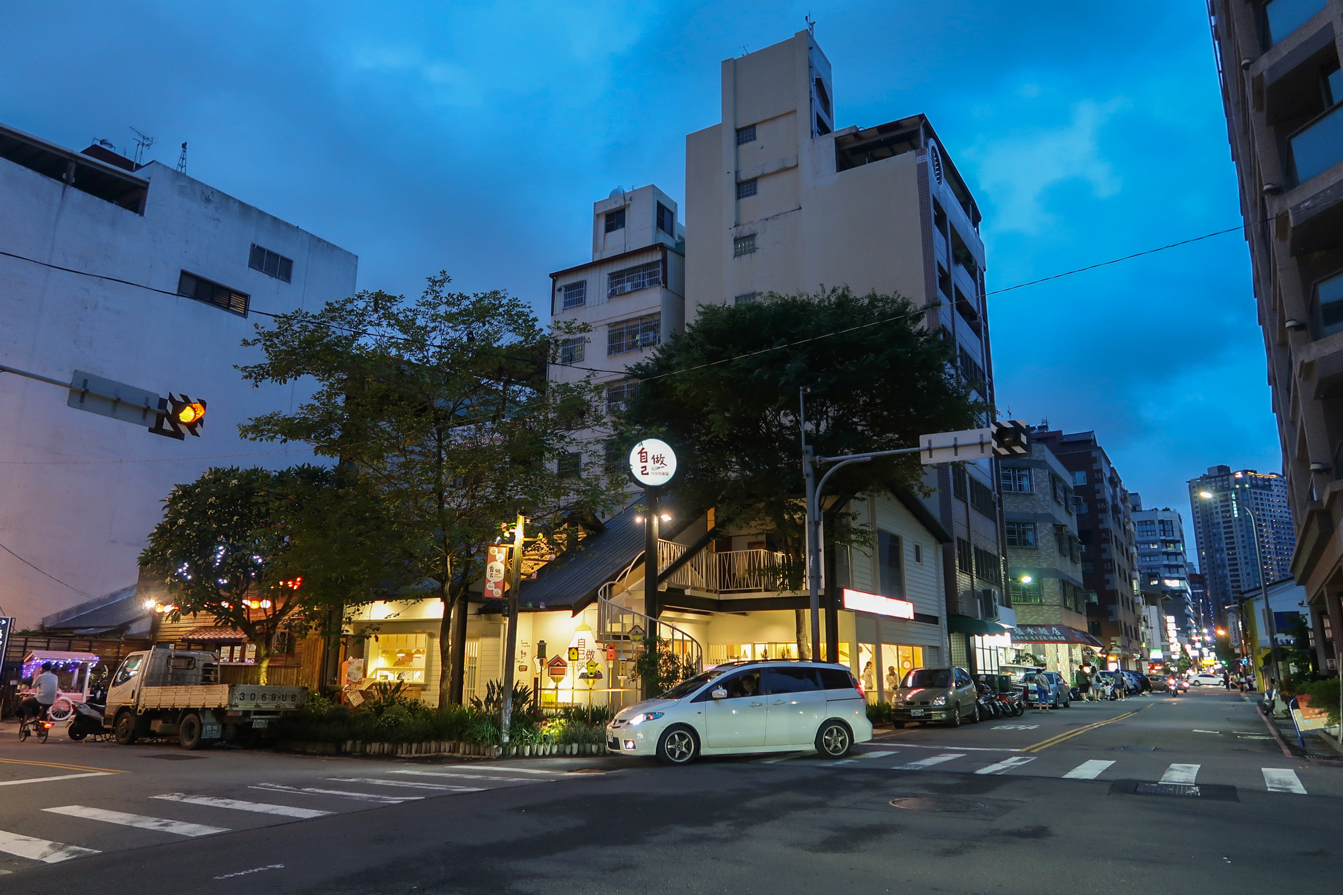 范特喜文創聚落7號